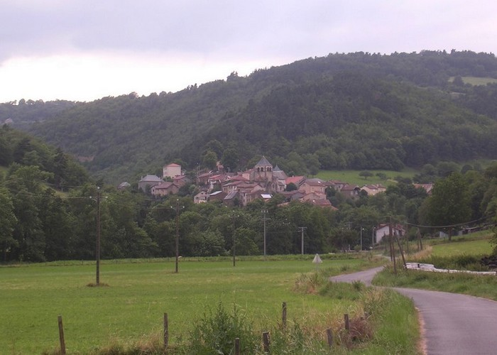 Village d'Auriac l'Eglise (Cantal)